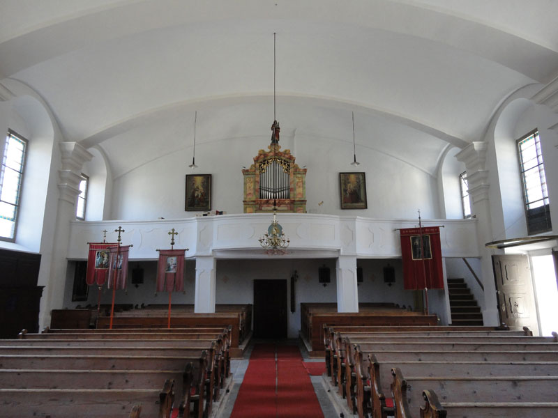 Orgelempore der Katholischen Pfarrkirche Donnersbach